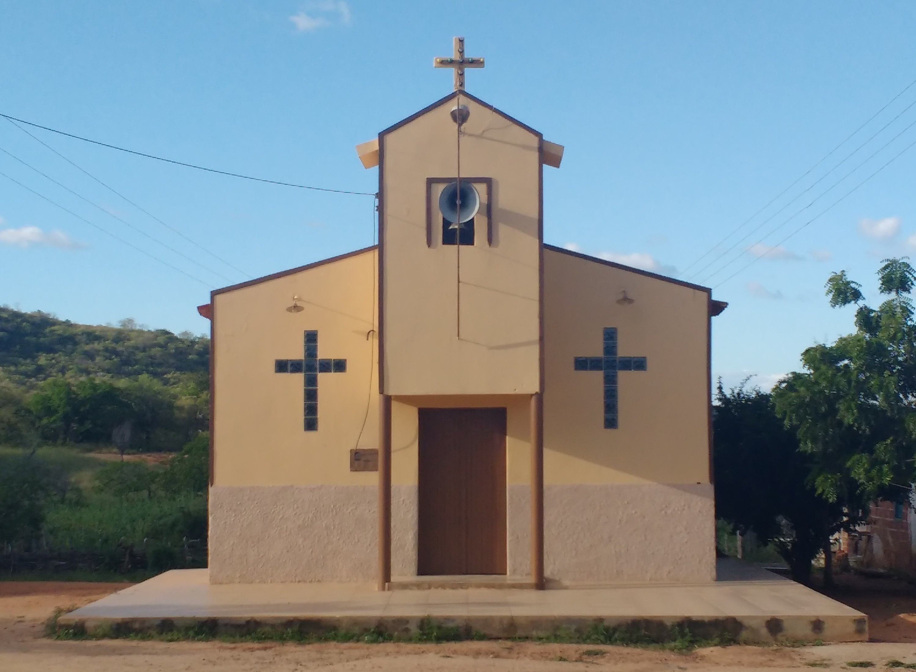 Capela de Nossa Senhora da Conceição, da paróquia de Santo Antônio, sítio Vaca Morta, zona rural de Marcelino Vieira, Rio Grande do Norte (Brasil).